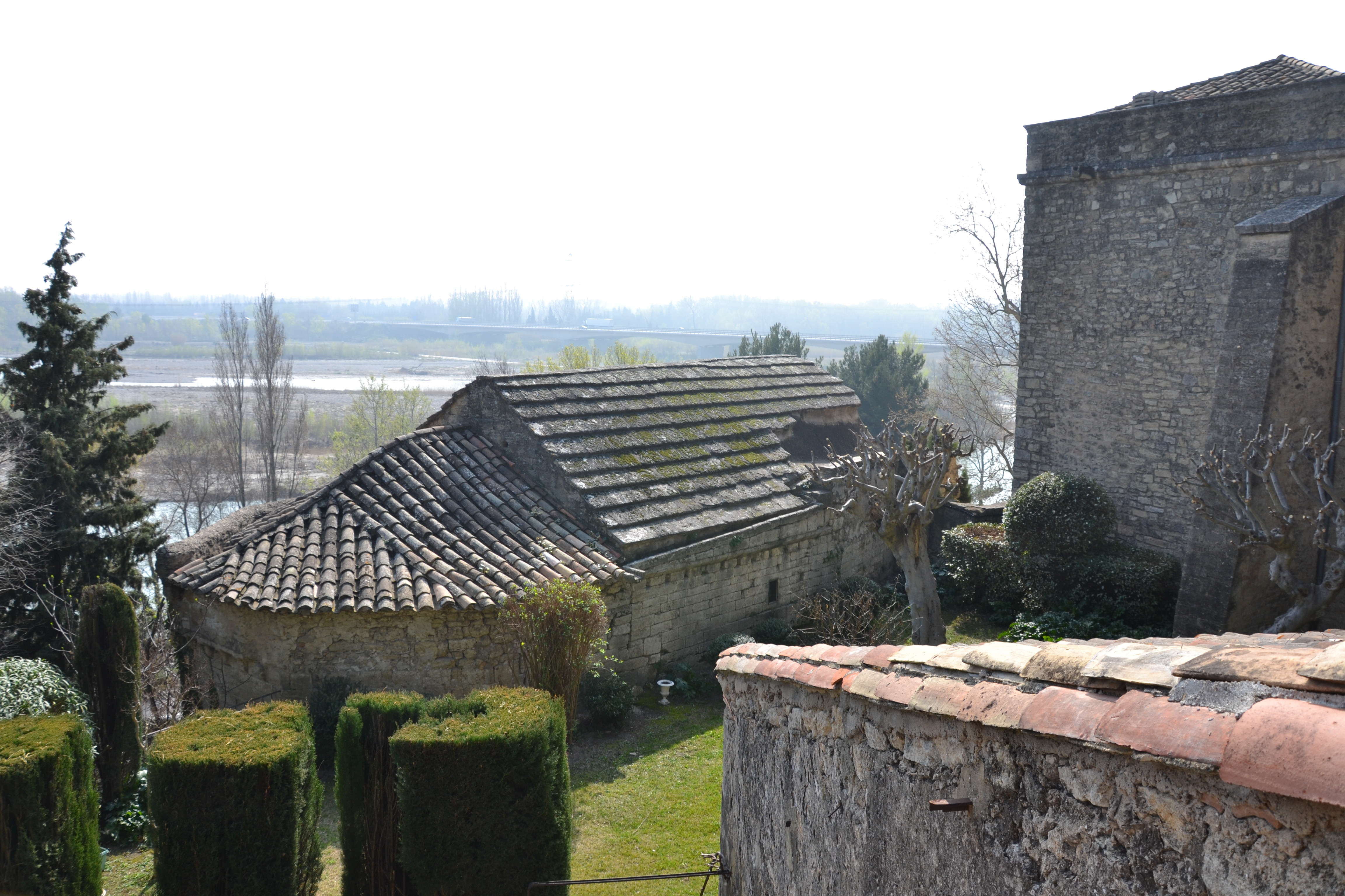 toiture de la chapelle de la chartreuse de Bonpas